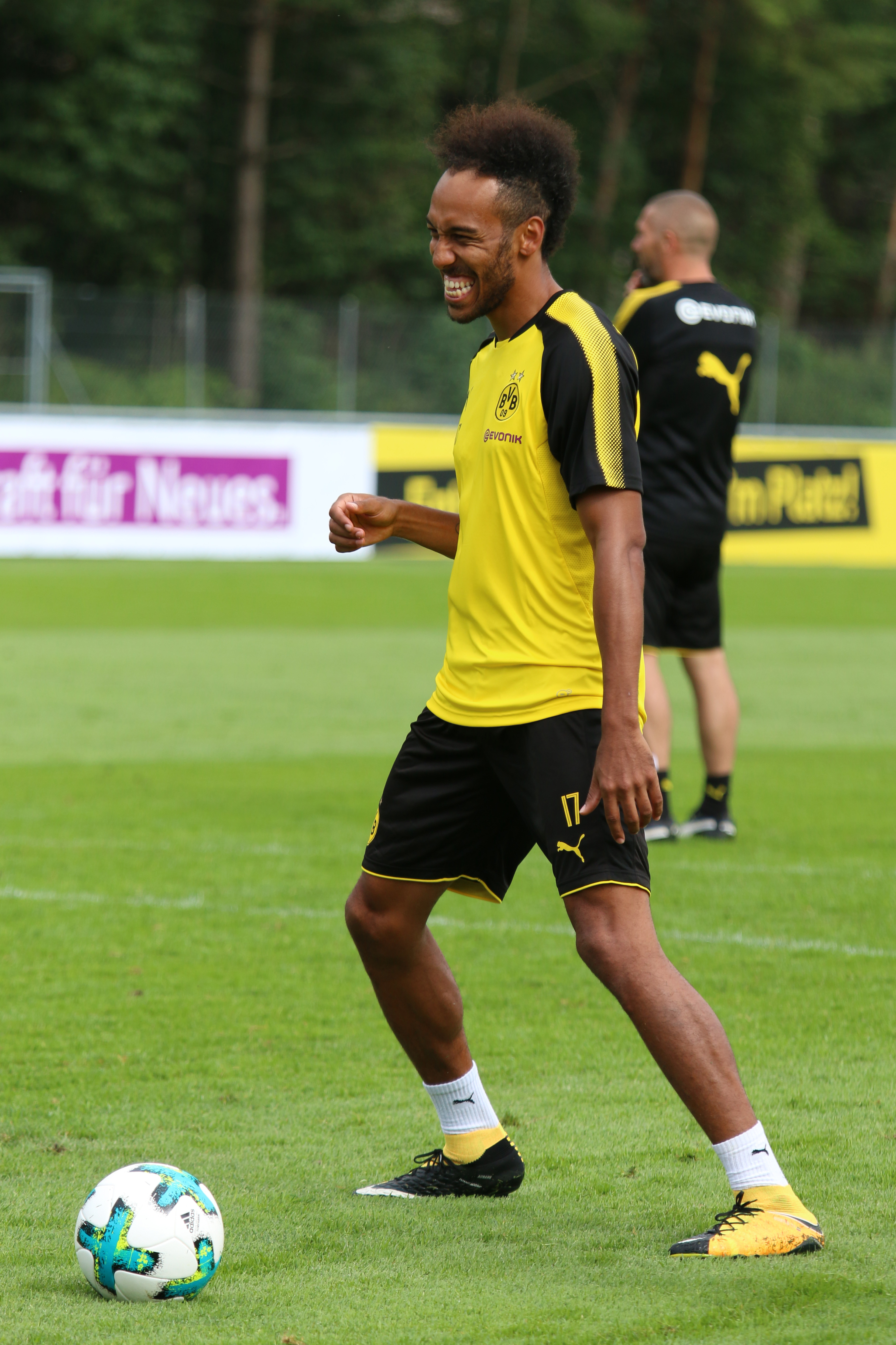 Pierre-Emerick Aubameyang im BVB Trainingslager in Bad Ragaz 2017